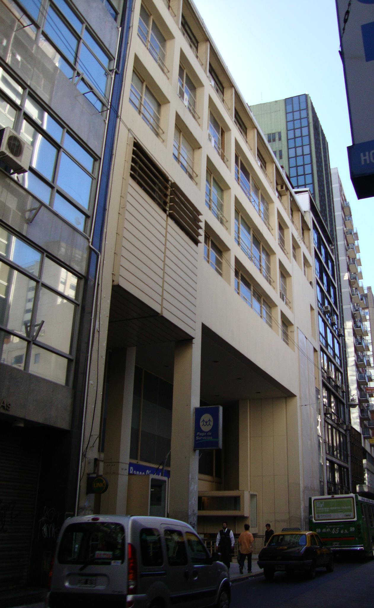 El Edificio Ventas del Banco de la Ciudad de Buenos Aires, también llamado "Complejo Esmeralda". Se encuentra en la calle Esmeralda 660. Construido en 1939, fue totalmente remodelado en 1968. Buenos Aires, Argentina.